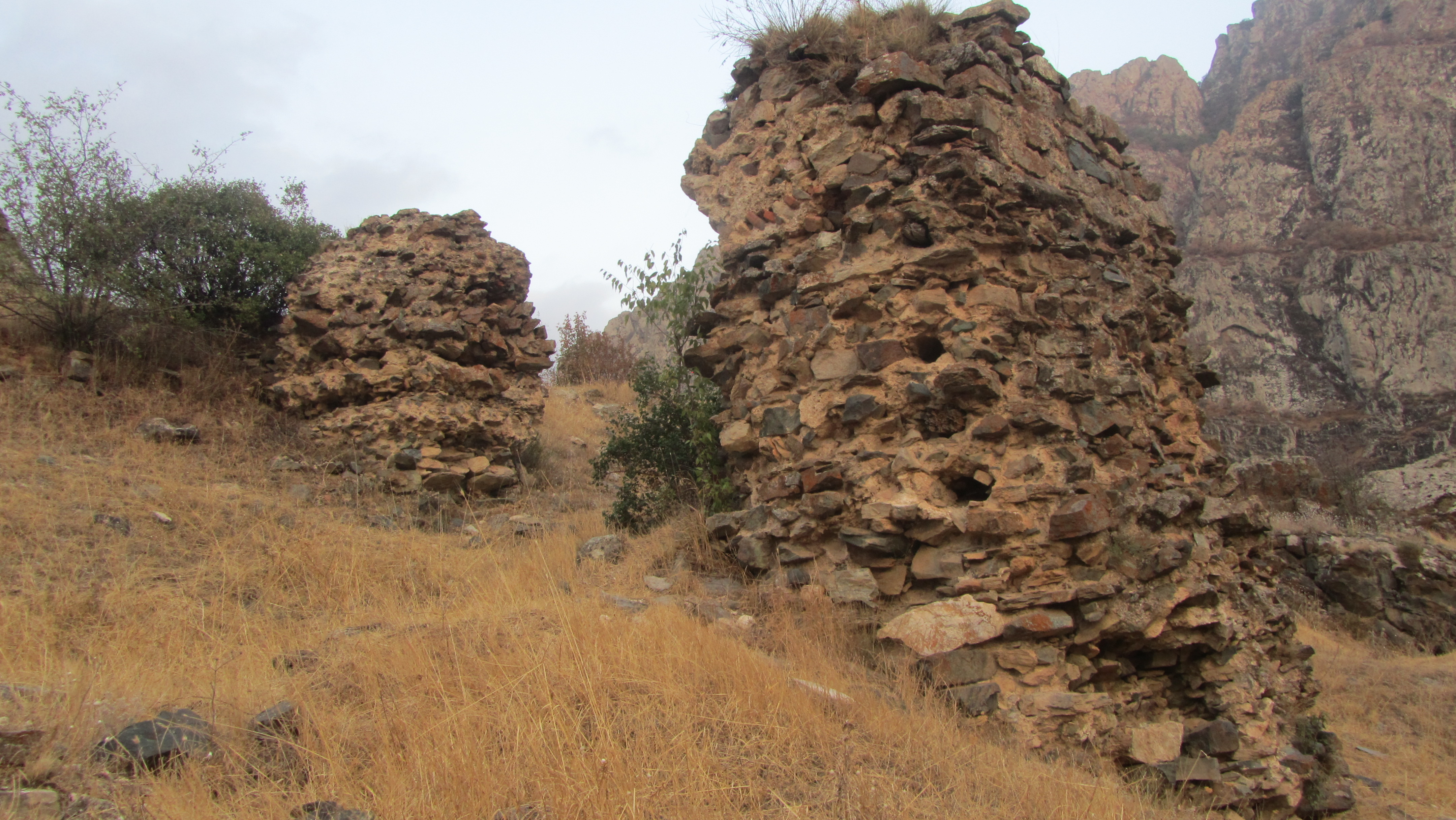 Ամրոց Բաղաբերդ (Դավիթ Բեկի բերդ) - Անդոկավան - քաղաքից ամ, Քաջա­րան տանող մայրուղուց ձախ, Ողջի գետի և նրա ձախ վտակ Գիրաթաղ գետակի միջև, բար­ձունքի վրա - Սյունիքի նշանավոր ամրոցներից էր, կիսավեր 13.1/1